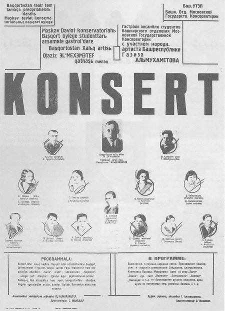 Башҡортса: Әлмөхәмәтов һәм Мәскәү дәүләт консерваторияһы Башҡорт бүлеге студенттары ансамбле гастролдәре афишаһы